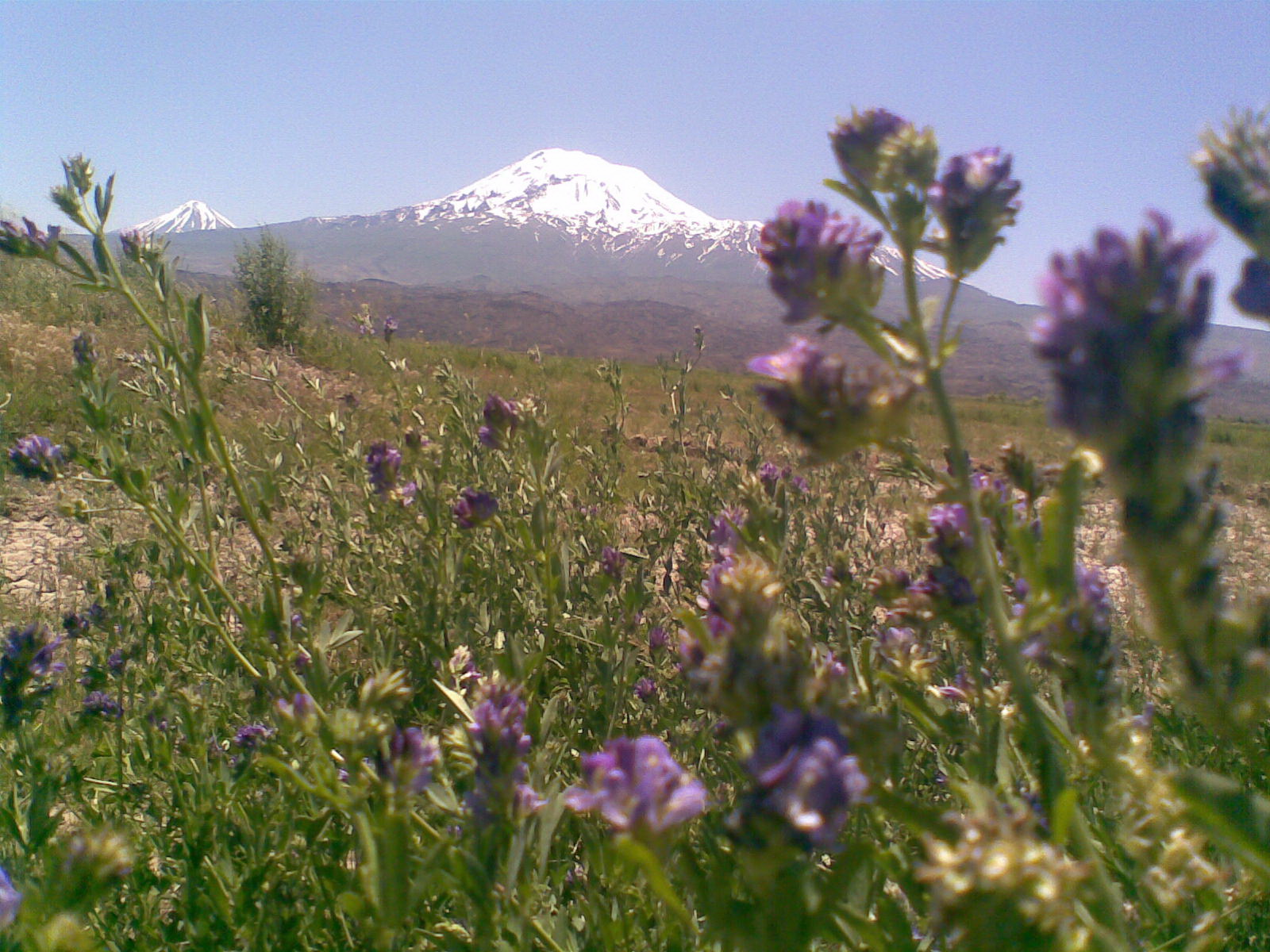 2010 yılında bizzat Ağrı Dağı'nın aşağı Bulakbaşı Köyünden kendi çekimim.